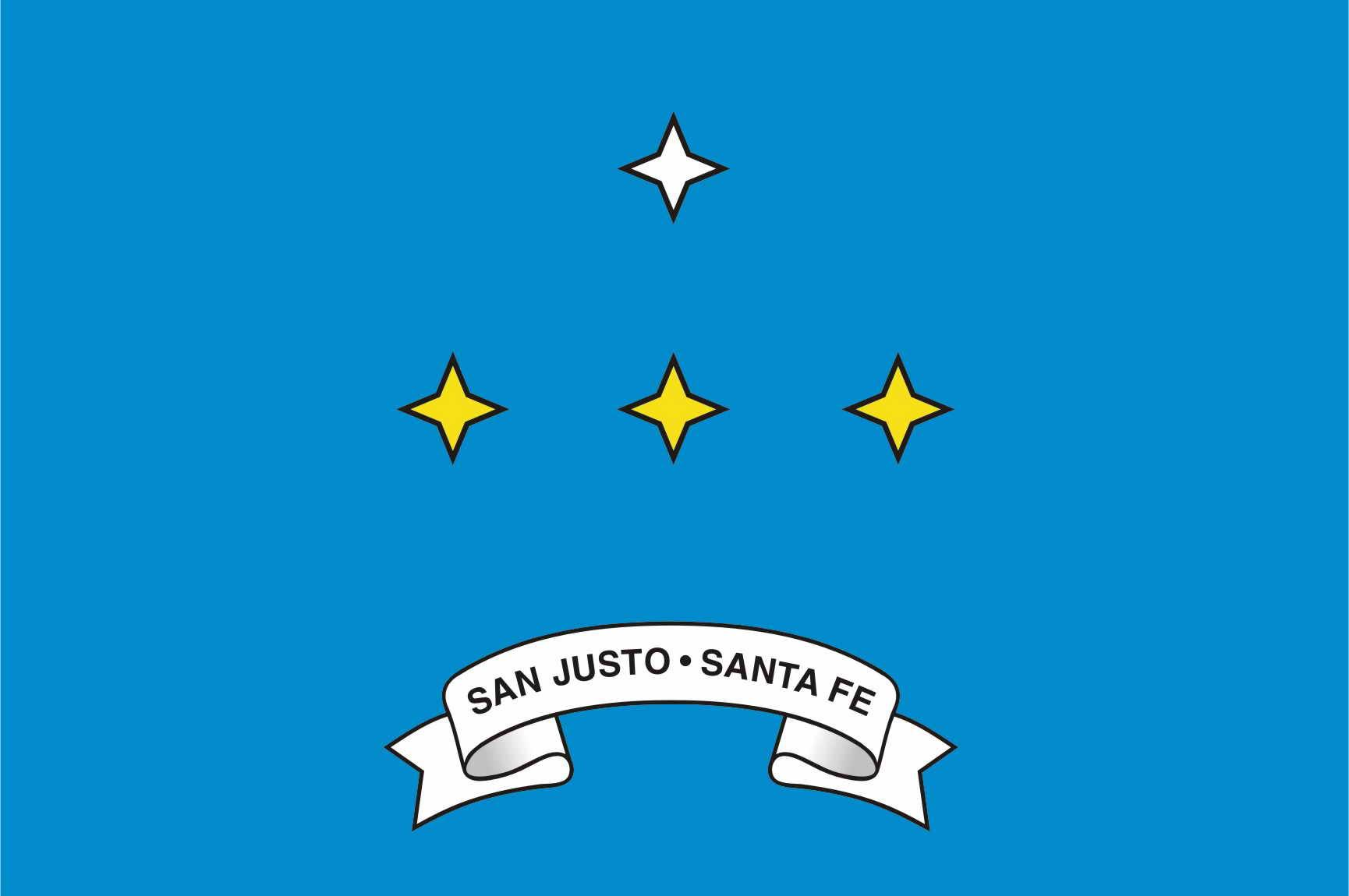 Bandera de la ciudad de San Justo, Santa Fe